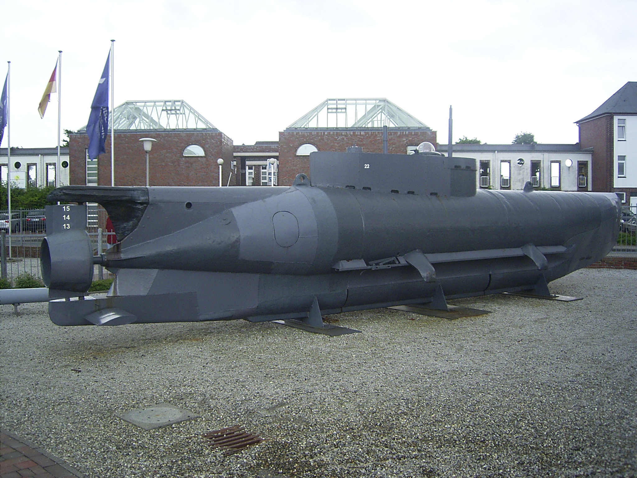 Restauriertes Kleinst-Uboot Seehund im Außengelände des Marinemuseums Wilhelmhaven.